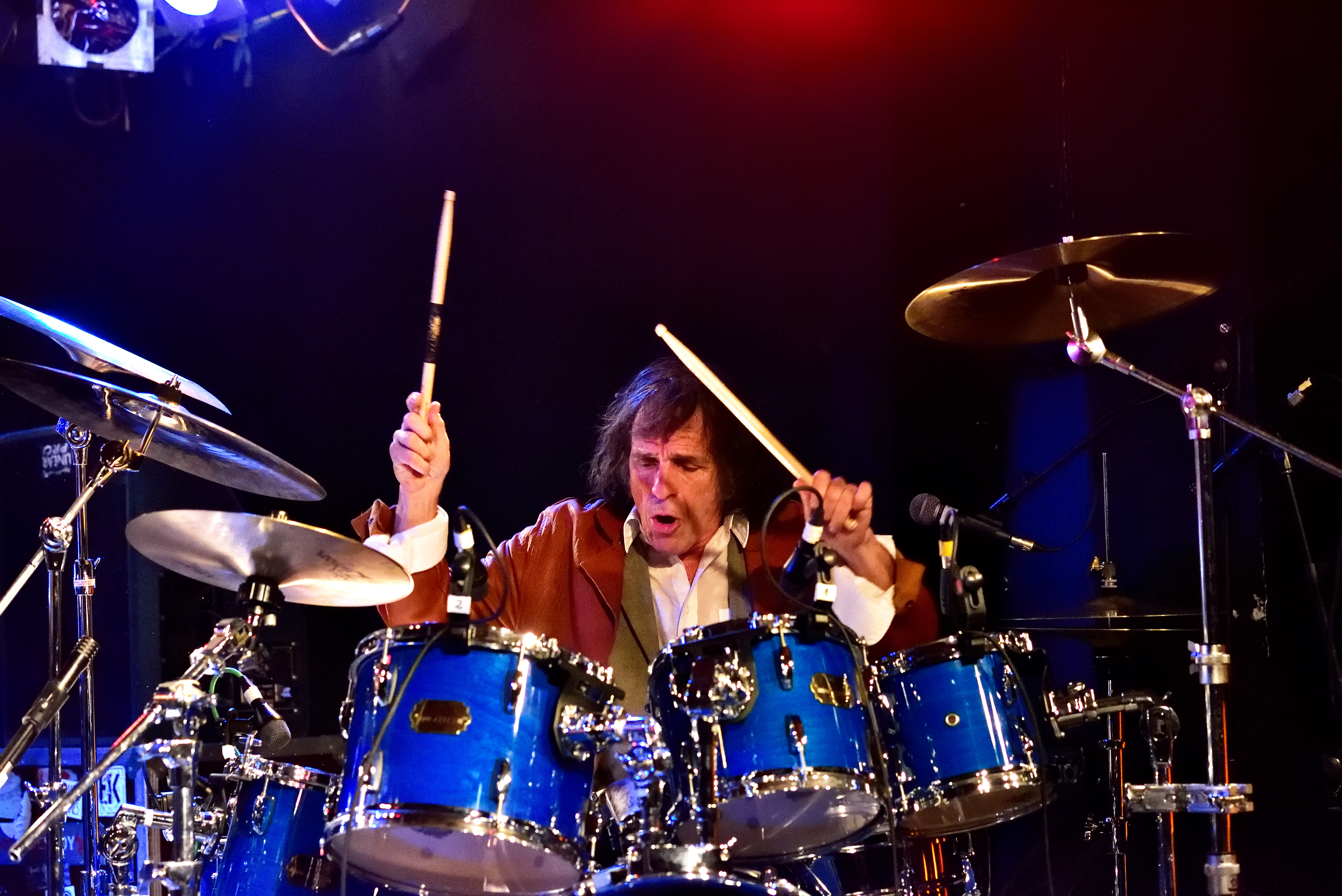 Corky Laing bei The German Sleighrige Tour 2016 in der Markthalle Hamburg